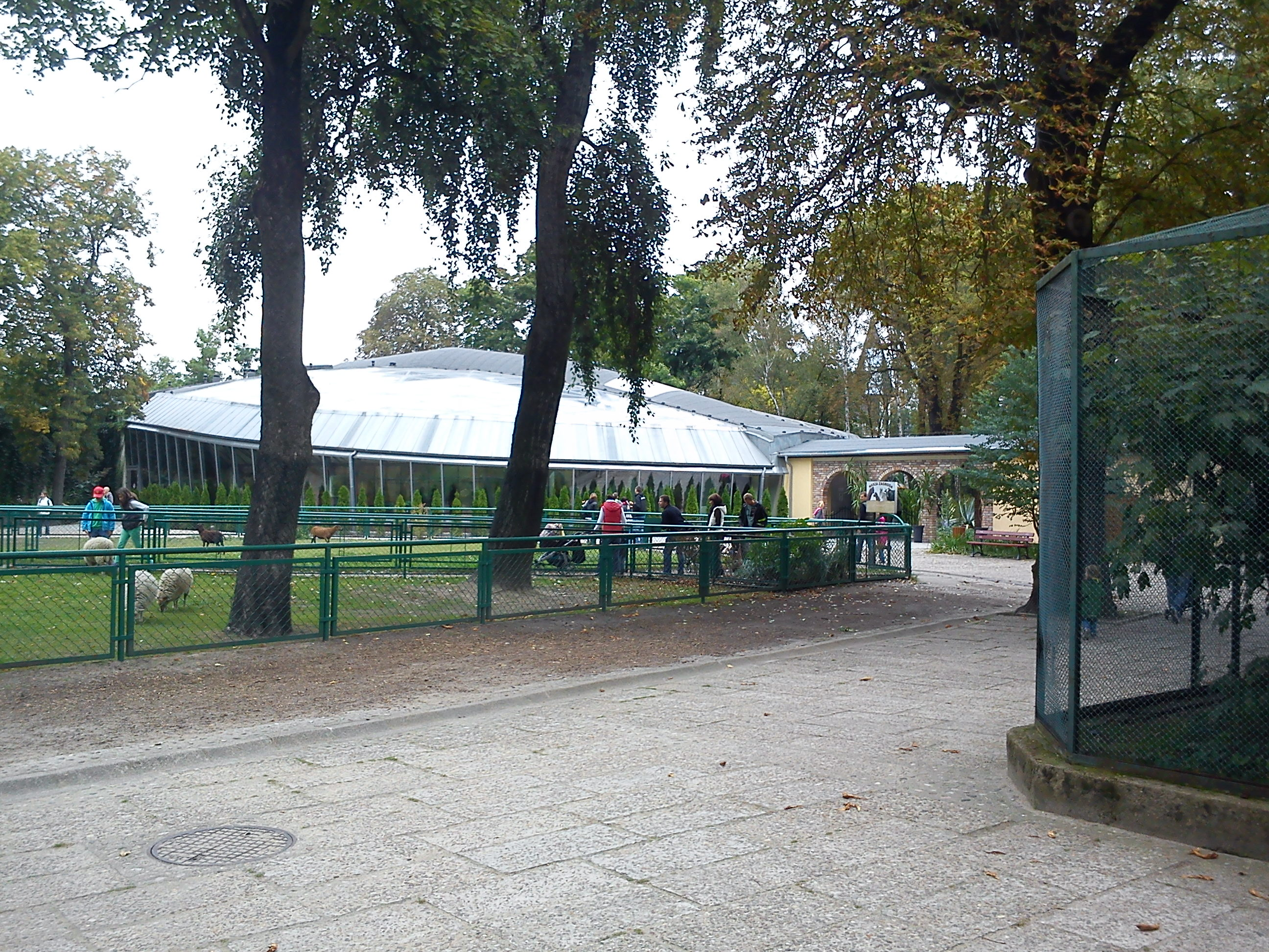 Poznań, Stare ZOO.